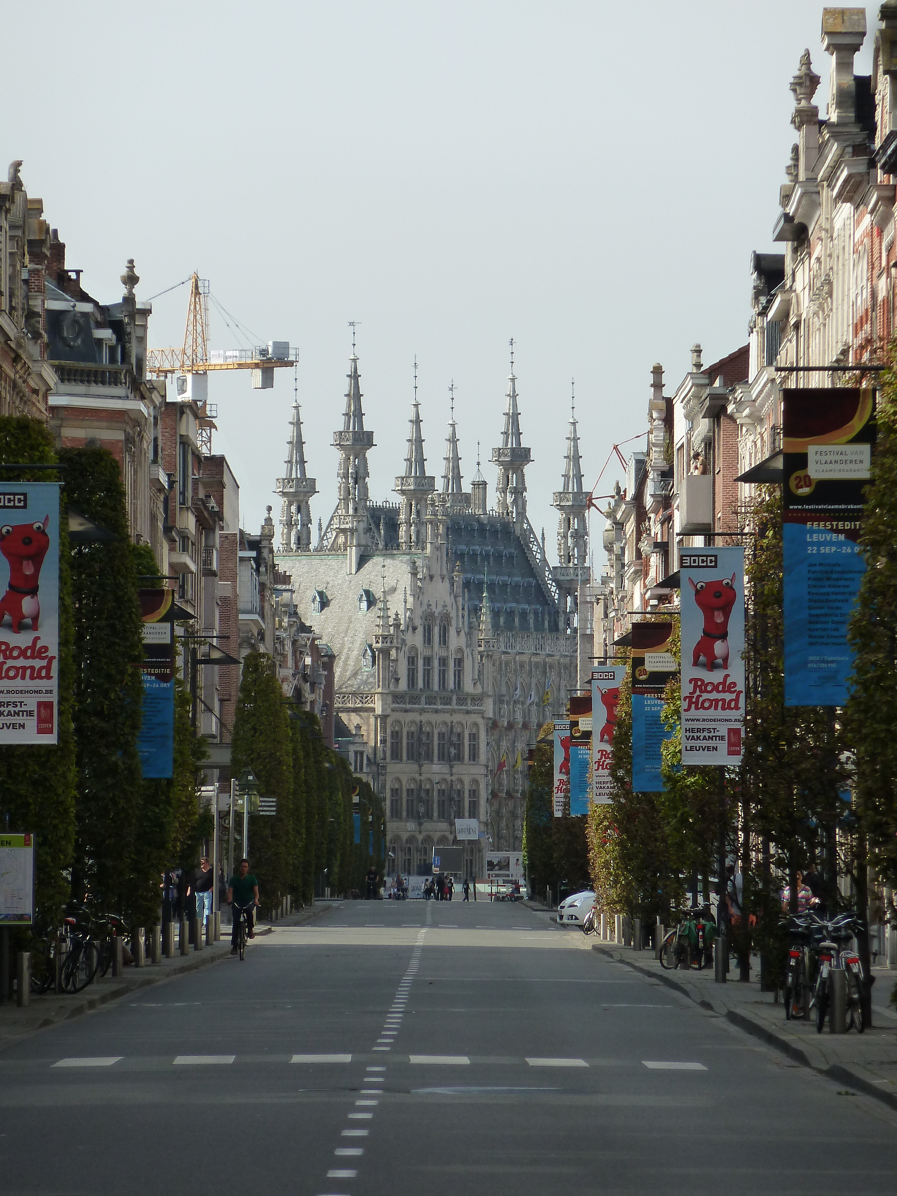 Stadhuis gezien vanuit de Bondgenotenlaan, Leuven, België